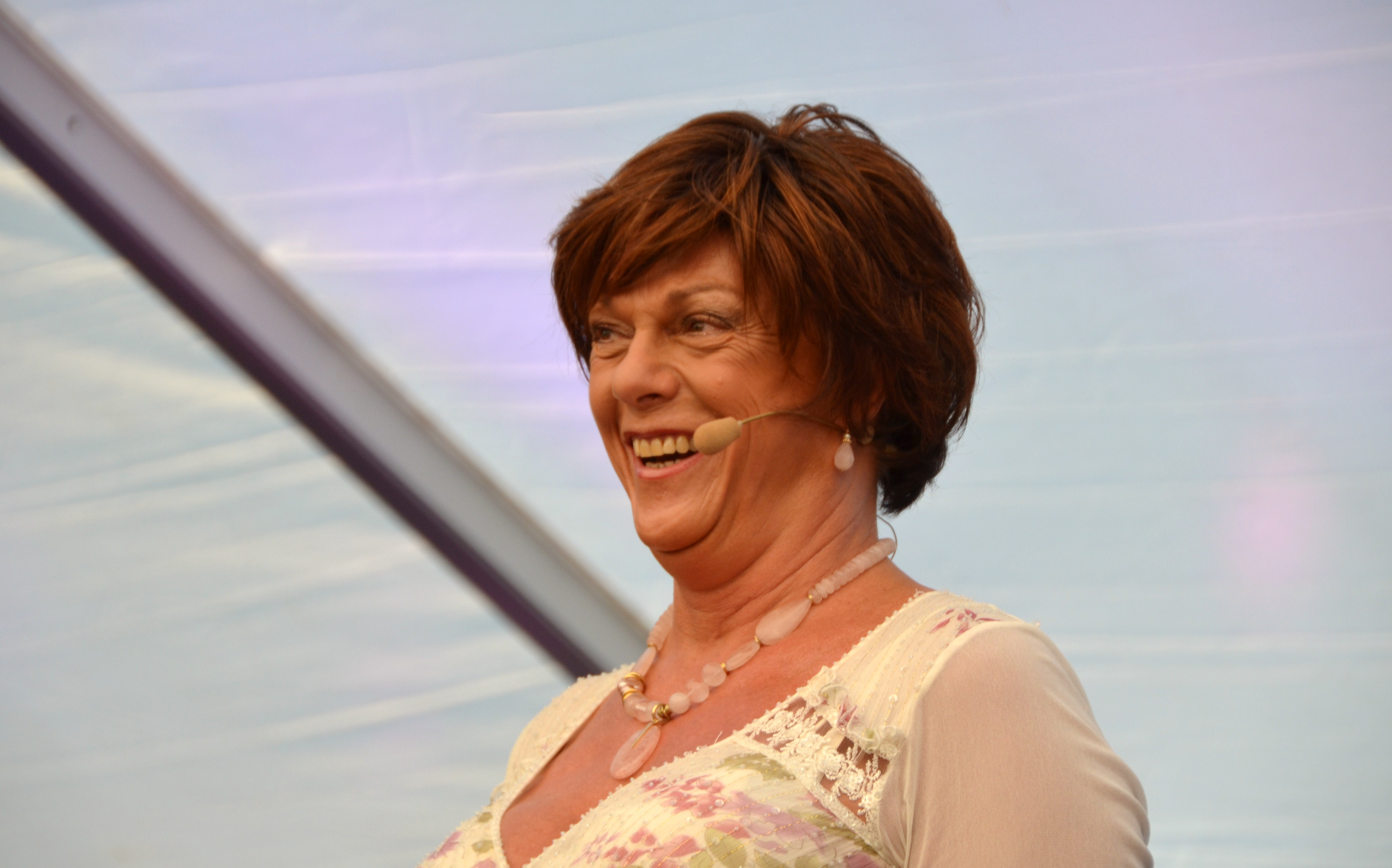 Esben Esther Pirelli Benestad ved Langesund revyfestival 19.-21. august 2011.